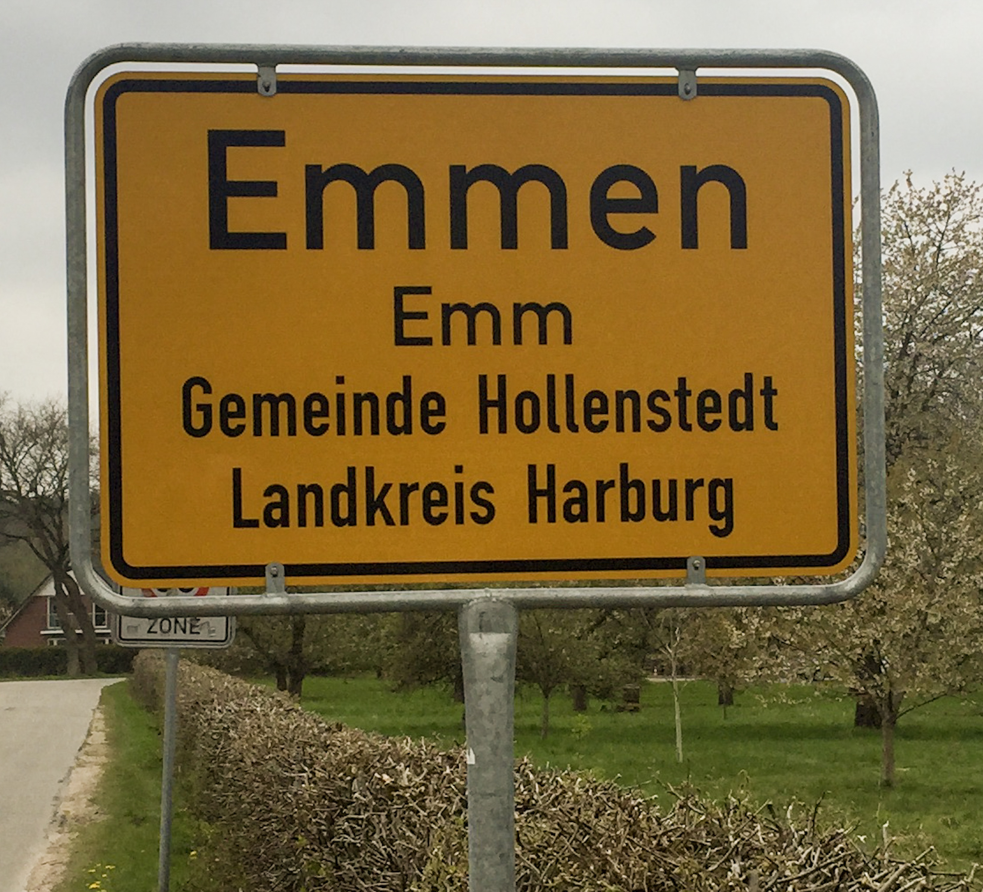 Ortsschild Emmen